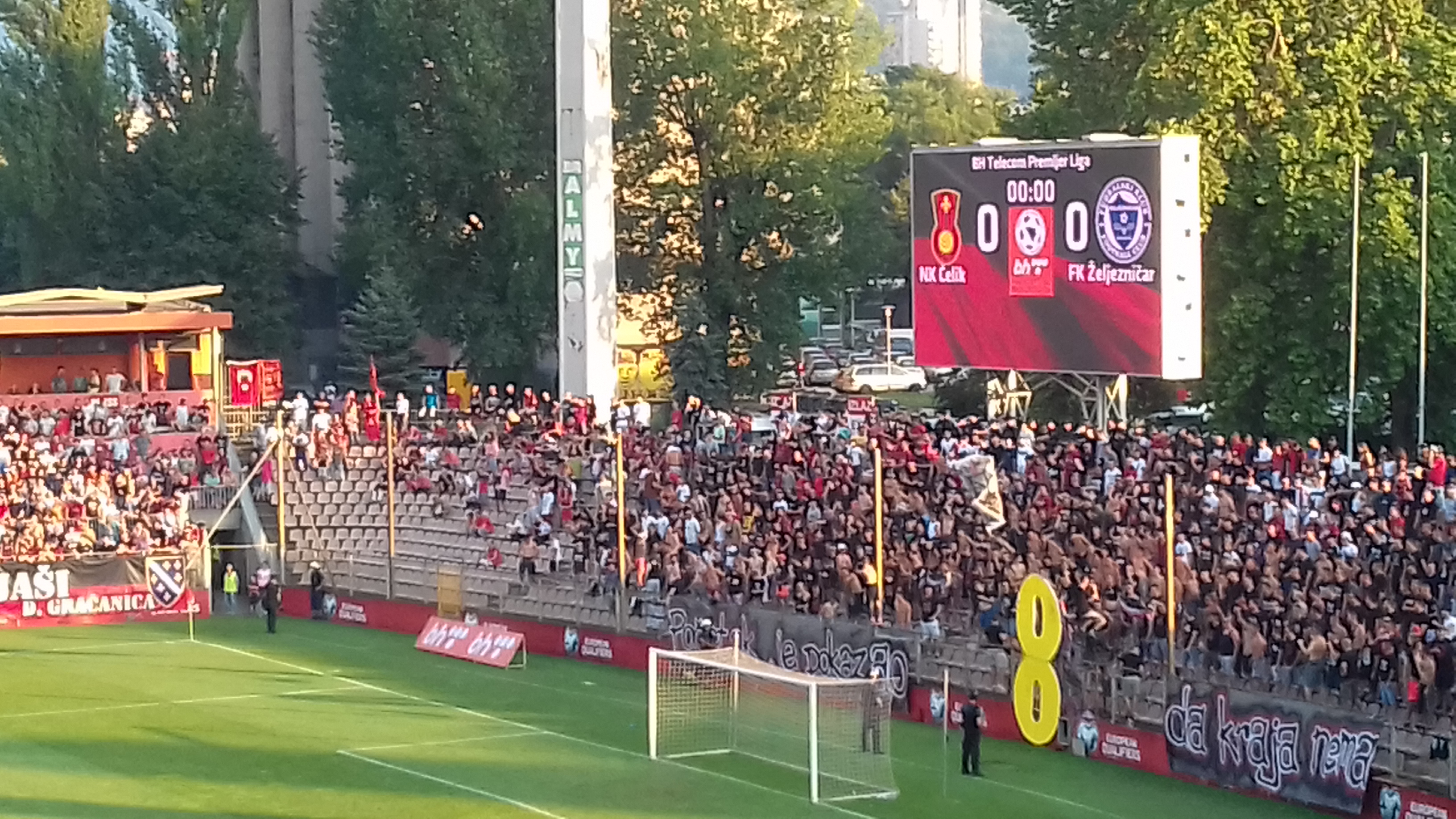 Утакмица 4. кола Премијер лиге БиХ у фудбалу, Челик против Жељезничара (0:2)